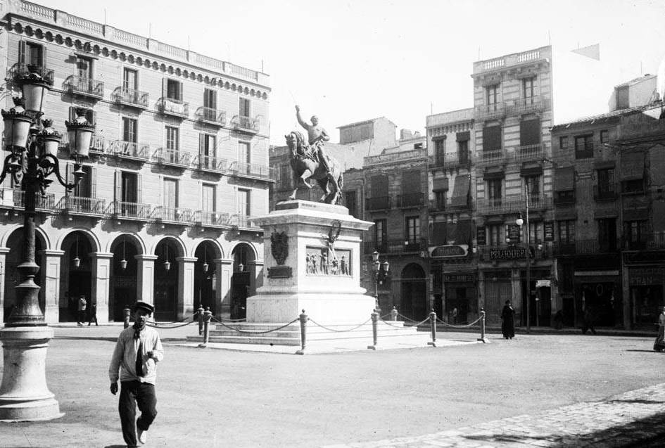 Imatge